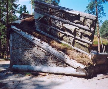 Grophus rekonstruerat i Gene fornby - 1